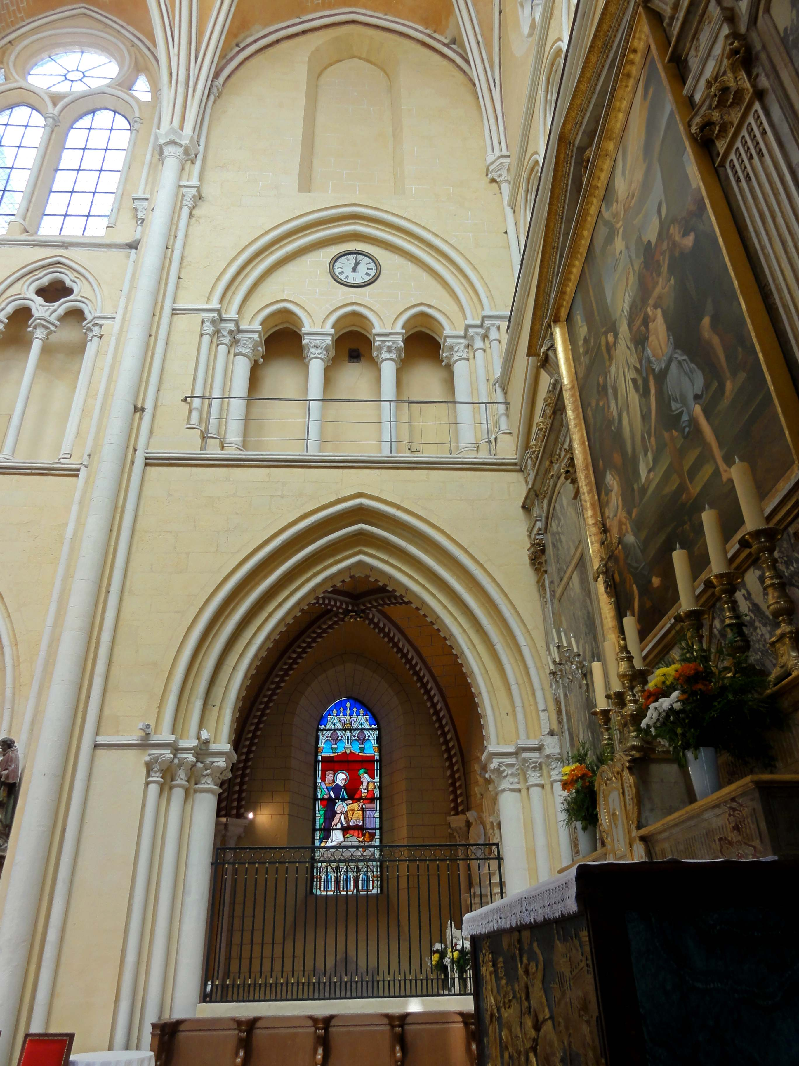 Voir titre.